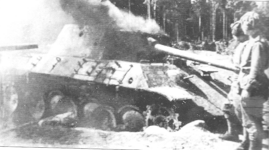 Carristi sovietici osservano in carro tedesco Panther distrutto nell'estate 1944